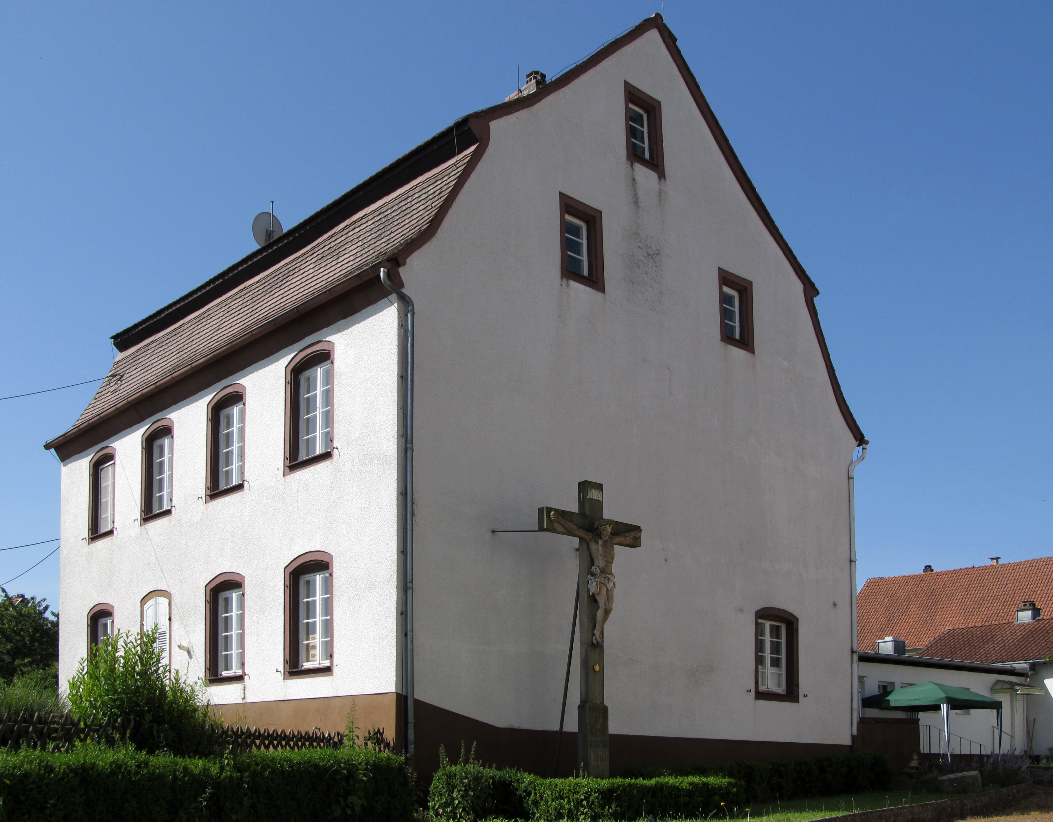 Das katholische Pfarrhaus in Medelsheim, Saarland